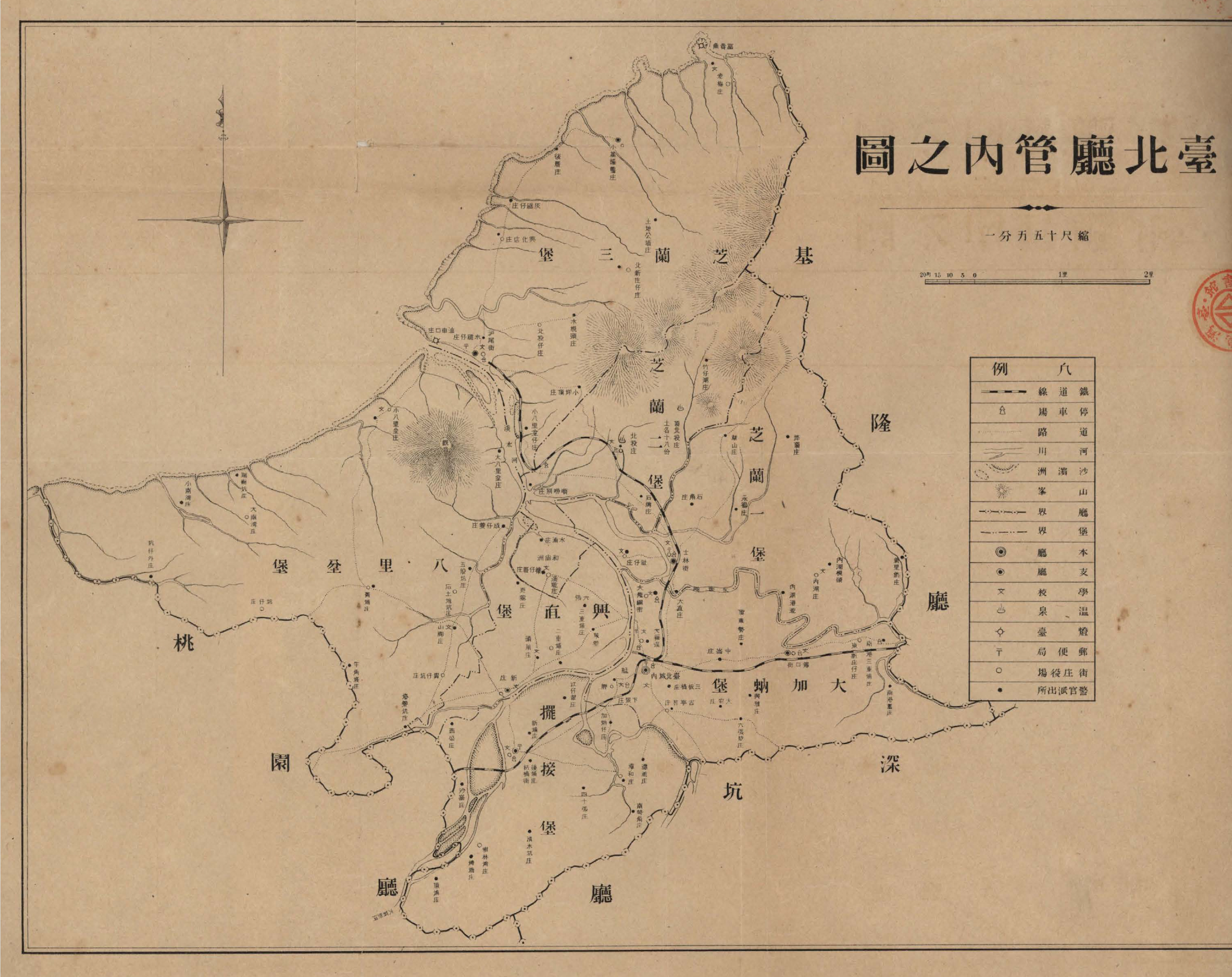 1917年的臺北廳地圖，圖上標有堡名和街庄名。其範圍約為現在台北市和新北市西側。